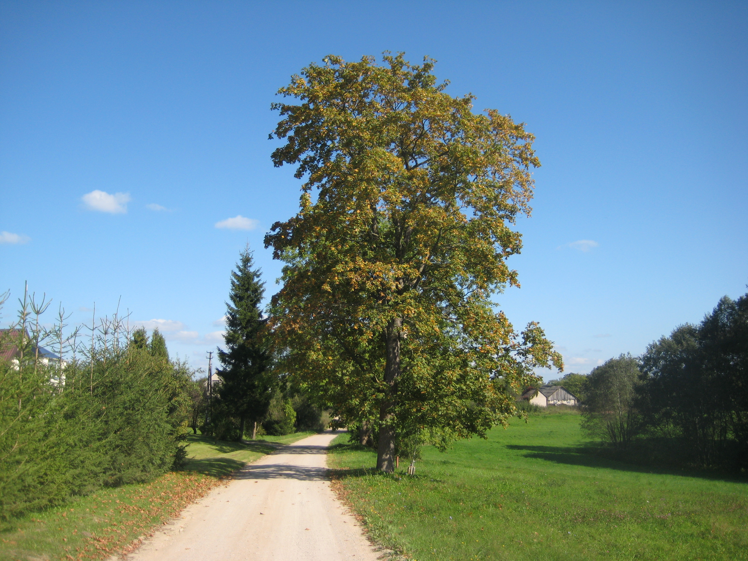 Bikuškis 28401, Lithuania